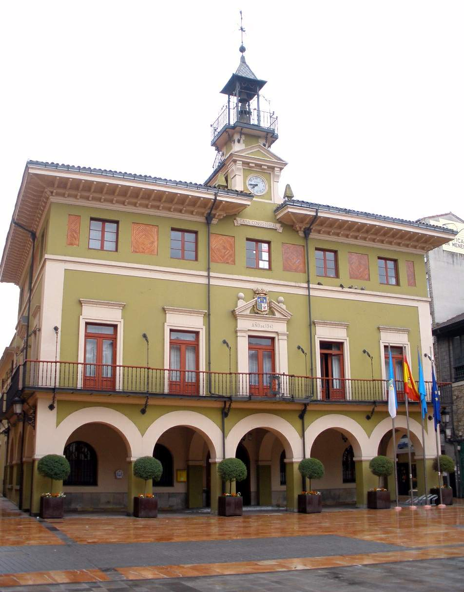 Ayuntamiento de Langreo, en Sama (Asturias)